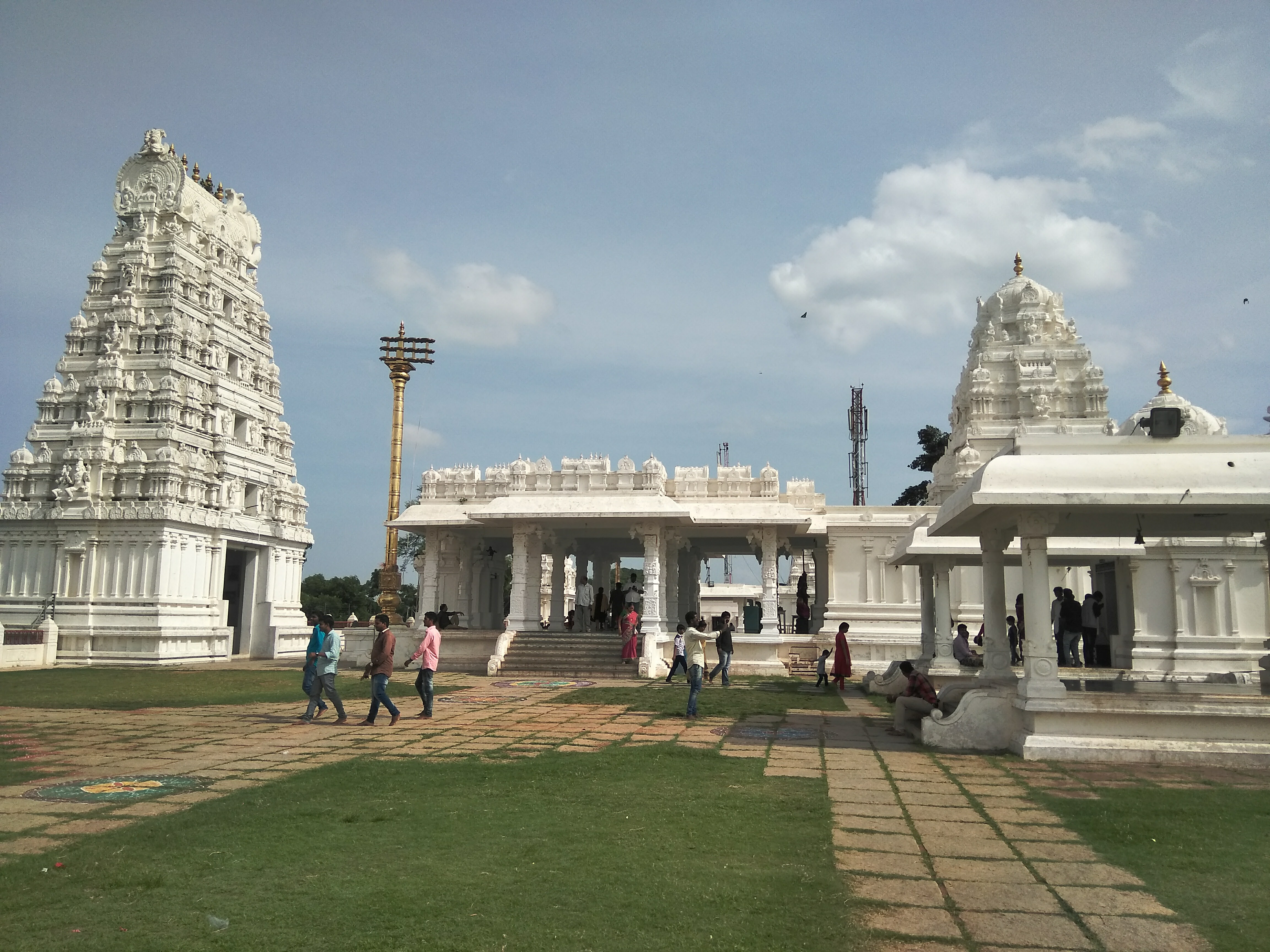 సంఘి దేవాలయం, హైదరాబాద్